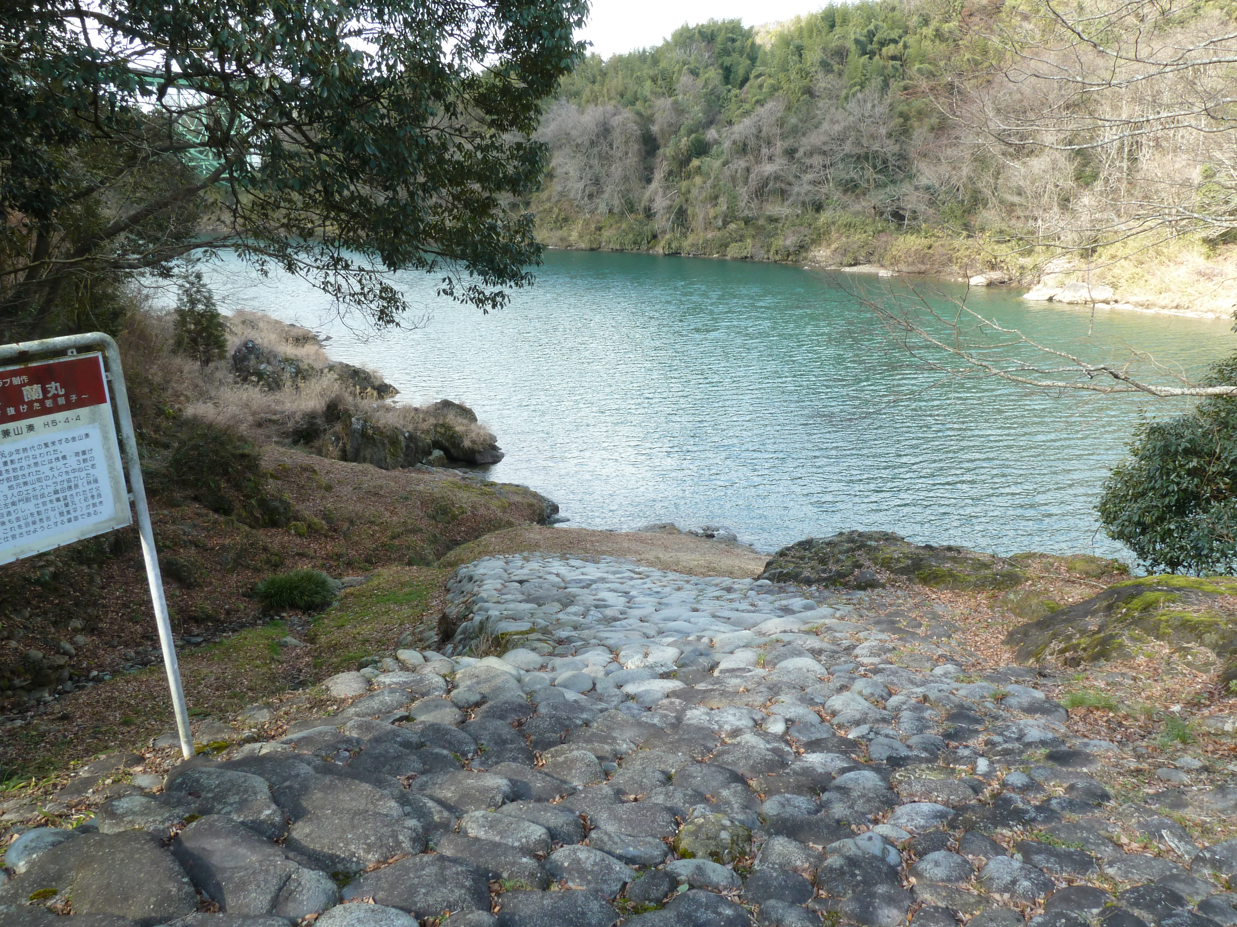 兼山湊跡地